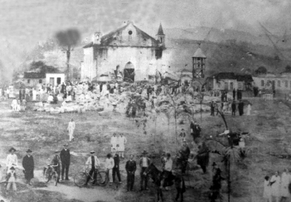 Igreja católica de Braço do Norte, construída por João Batista Uliano.